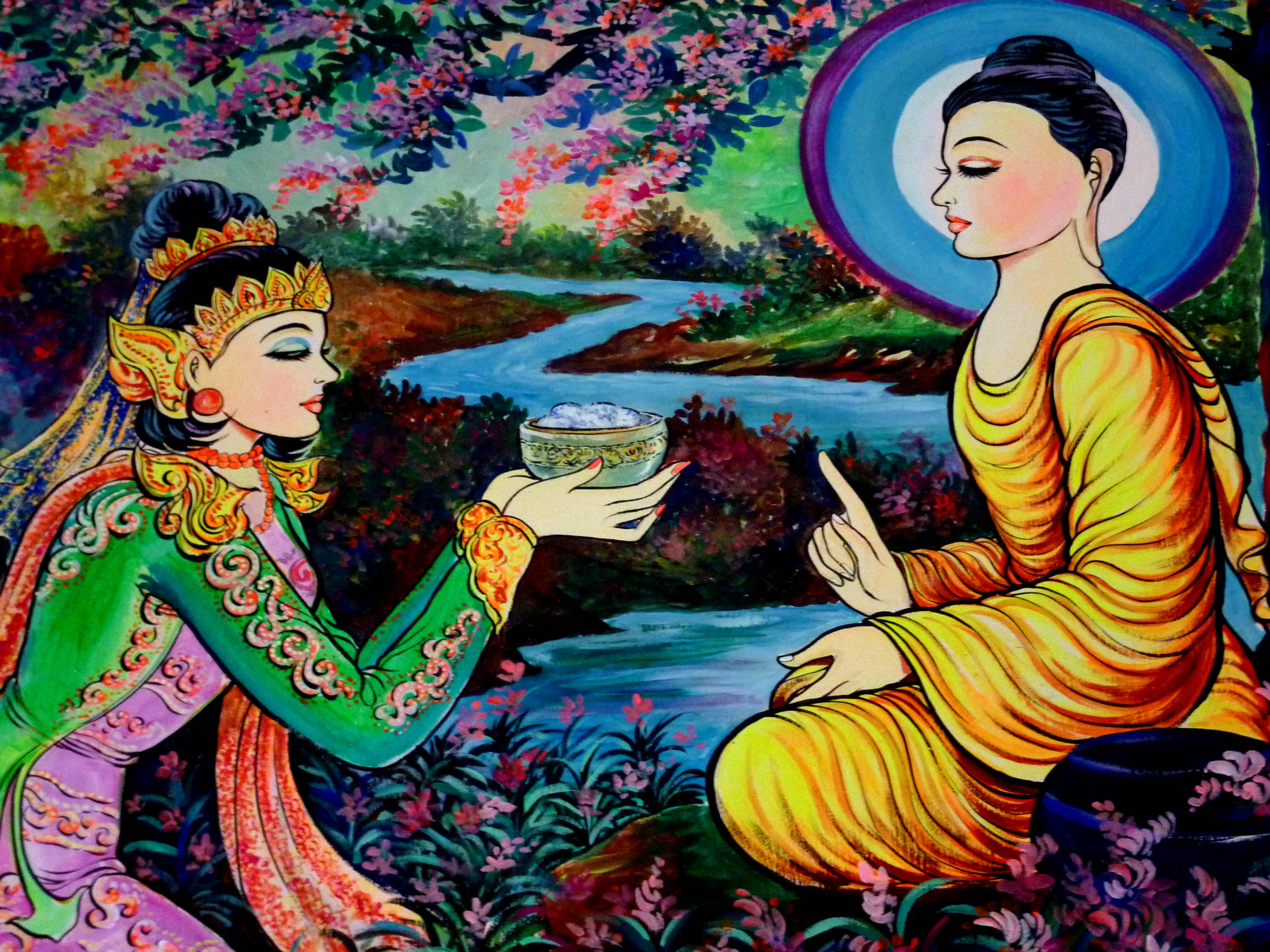 036 Sujata Offers Milk-Rice, at Wat Olak Madu, Kedah